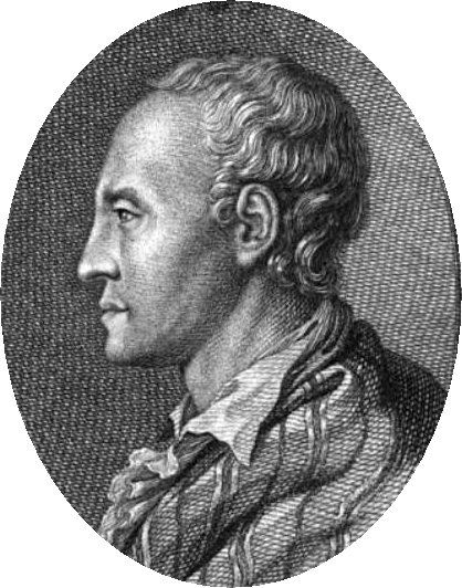 Ludwig Christoph Heinrich Hölty. In: Gedichte, Wien: F. A. Schrämbl, 1790